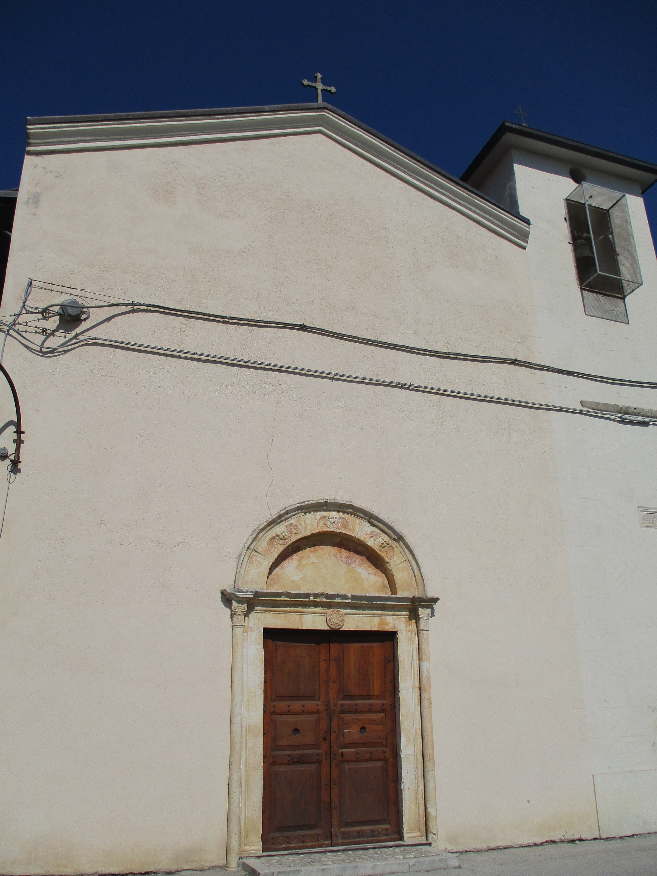 Chiesa di Santa Maria di Collemarciano